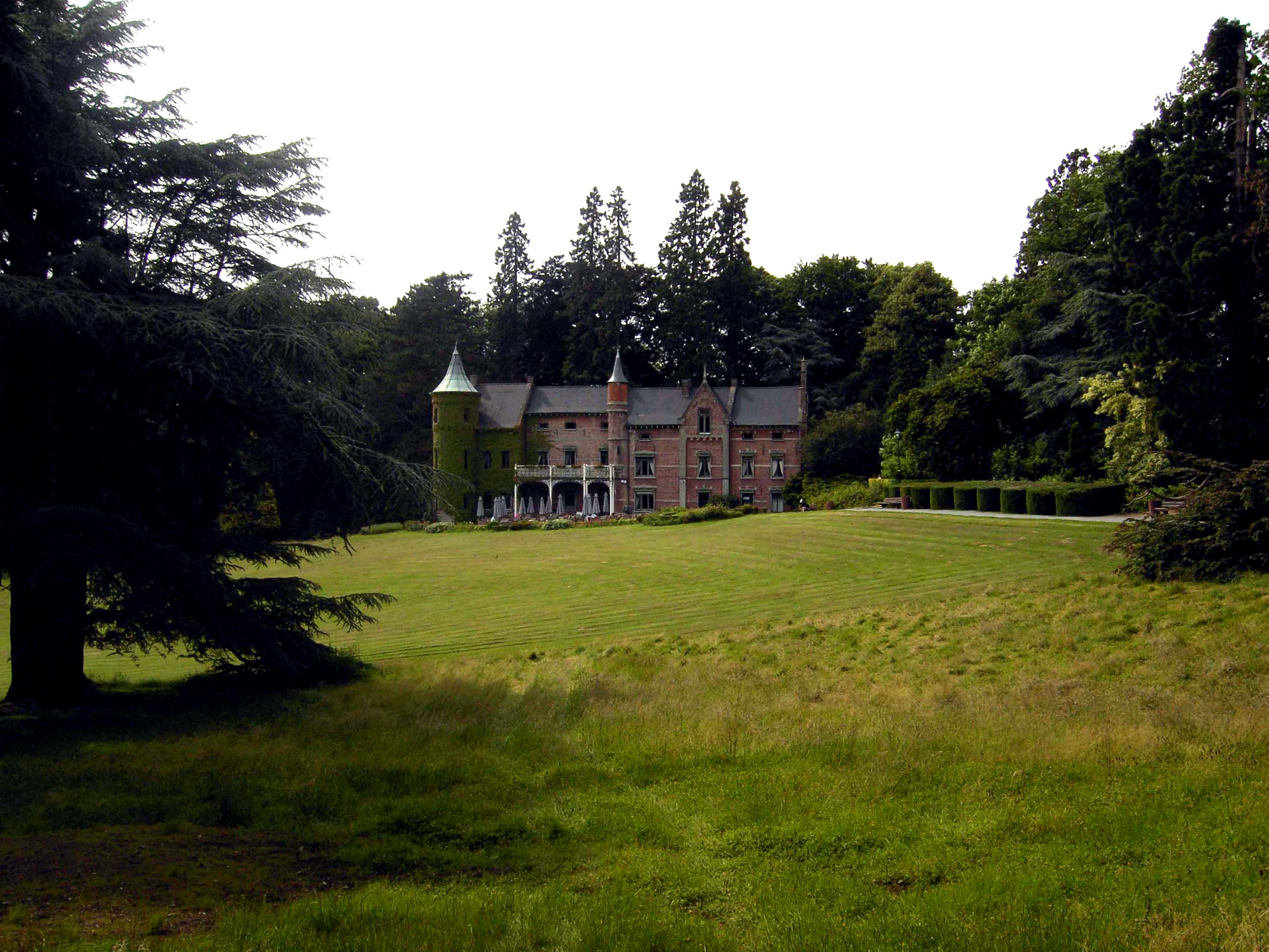 Grotenberge - Zottegem - België - domein Breivelde